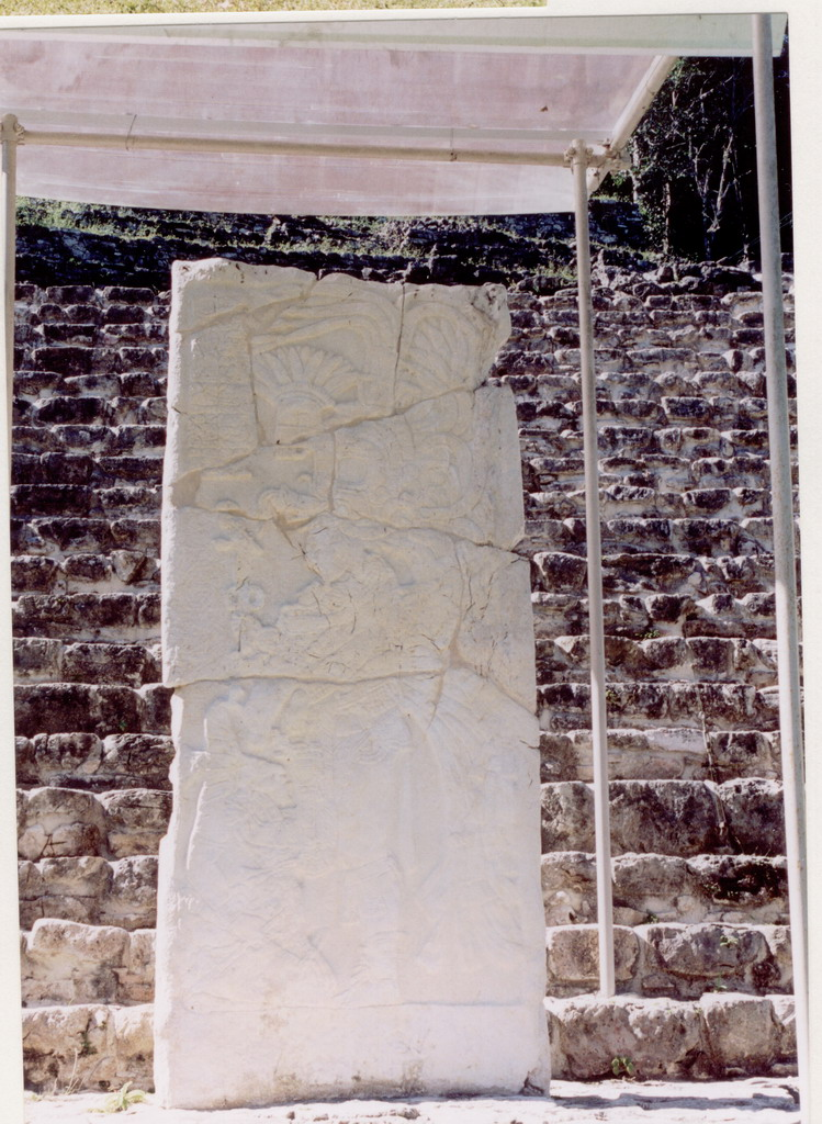 Bonampak - Stele n.3 gennaio 2002 Scansione da foto propria